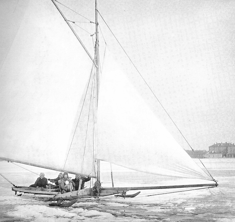 Буер "Метель". Создан в 1875 гjle.